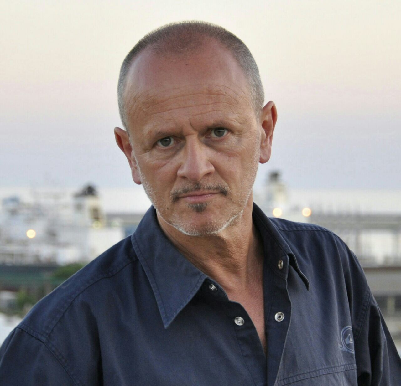 Carlo Denei comico